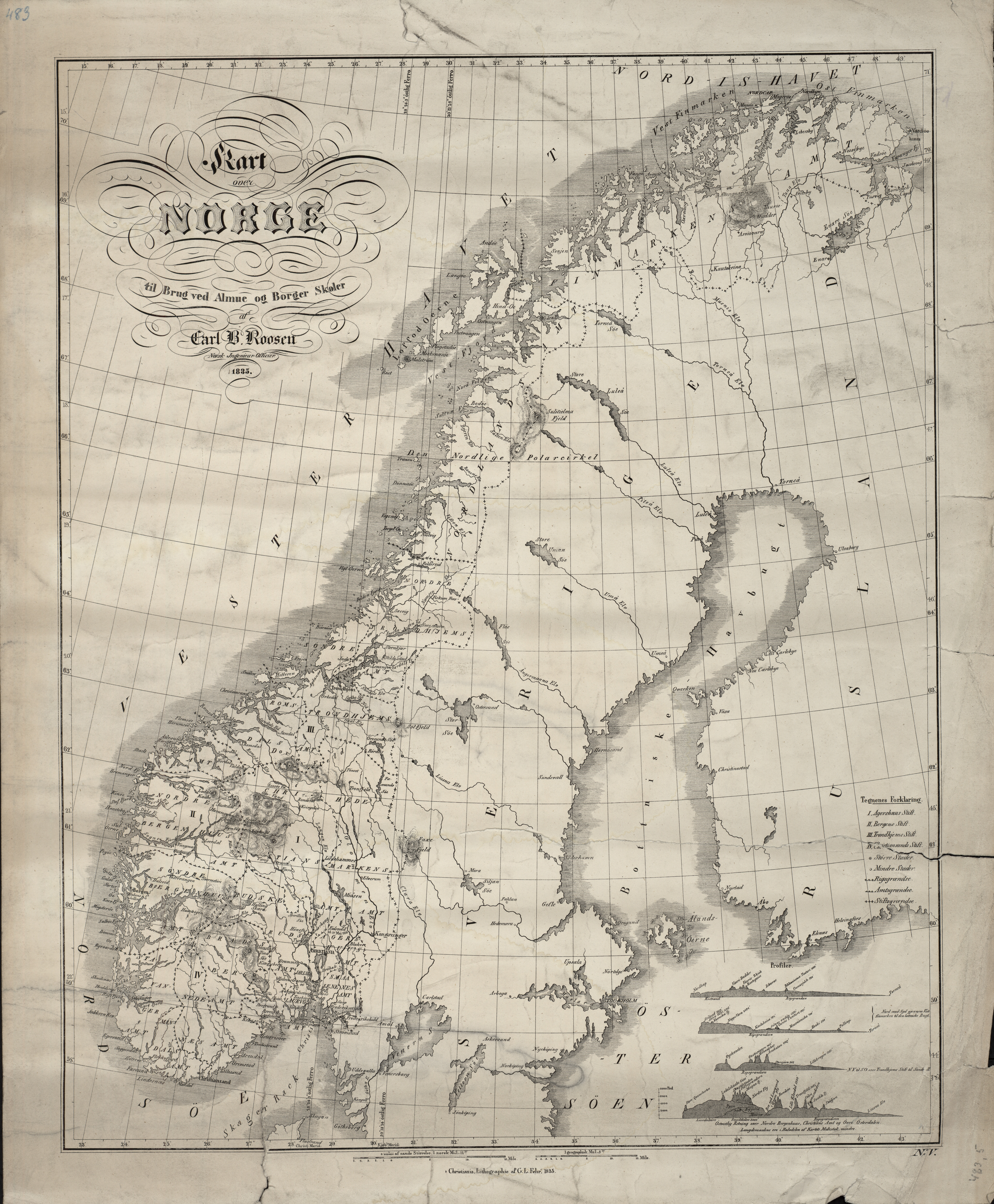 Kart fra Nasjonalbibliotekets kartsamling. Kartet er gitt ut i Kristiania (1835) og viser Norge.